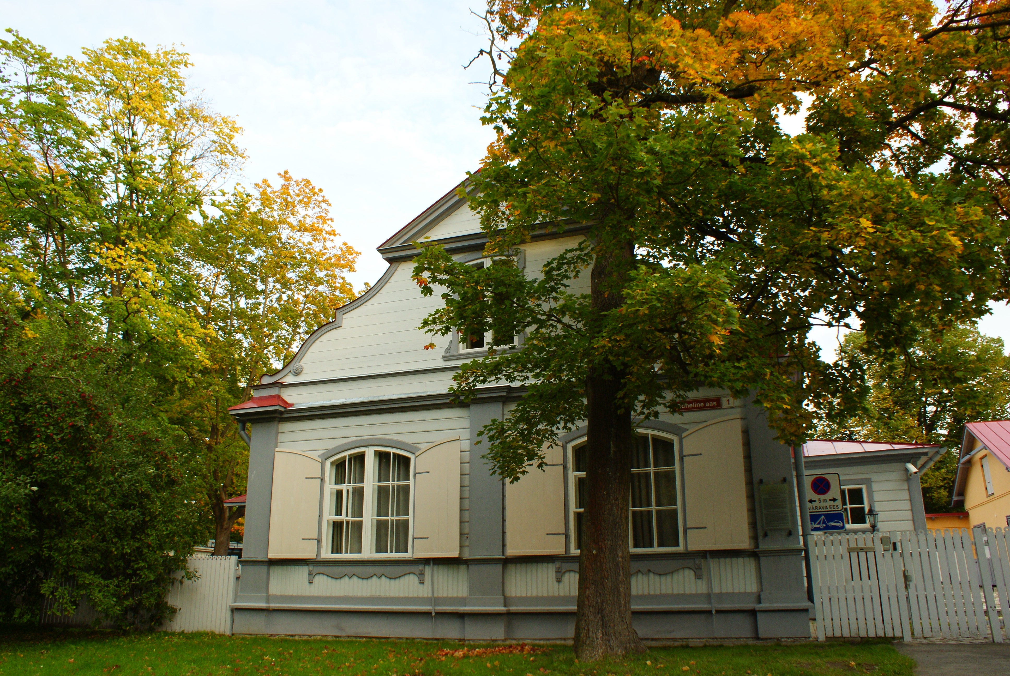 Kadrioru lossi aednikumaja